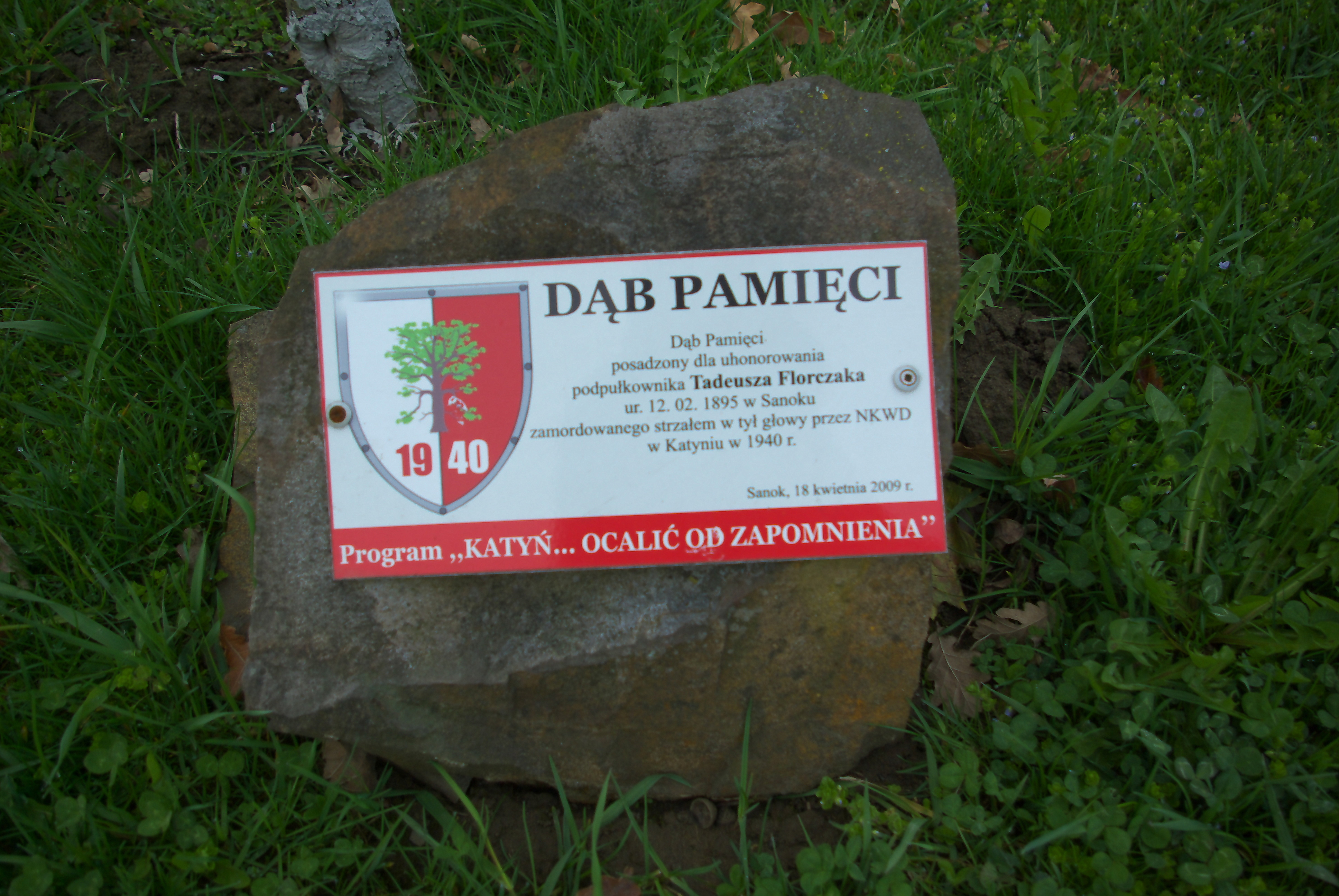 Kamień pamiątkowy przy Dębie Pamięci honorującym Tadeusza Florczaka na Cmentarzu Centralnym w Sanoku